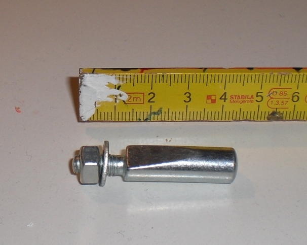 Fahrrad: Keil für Tretlager